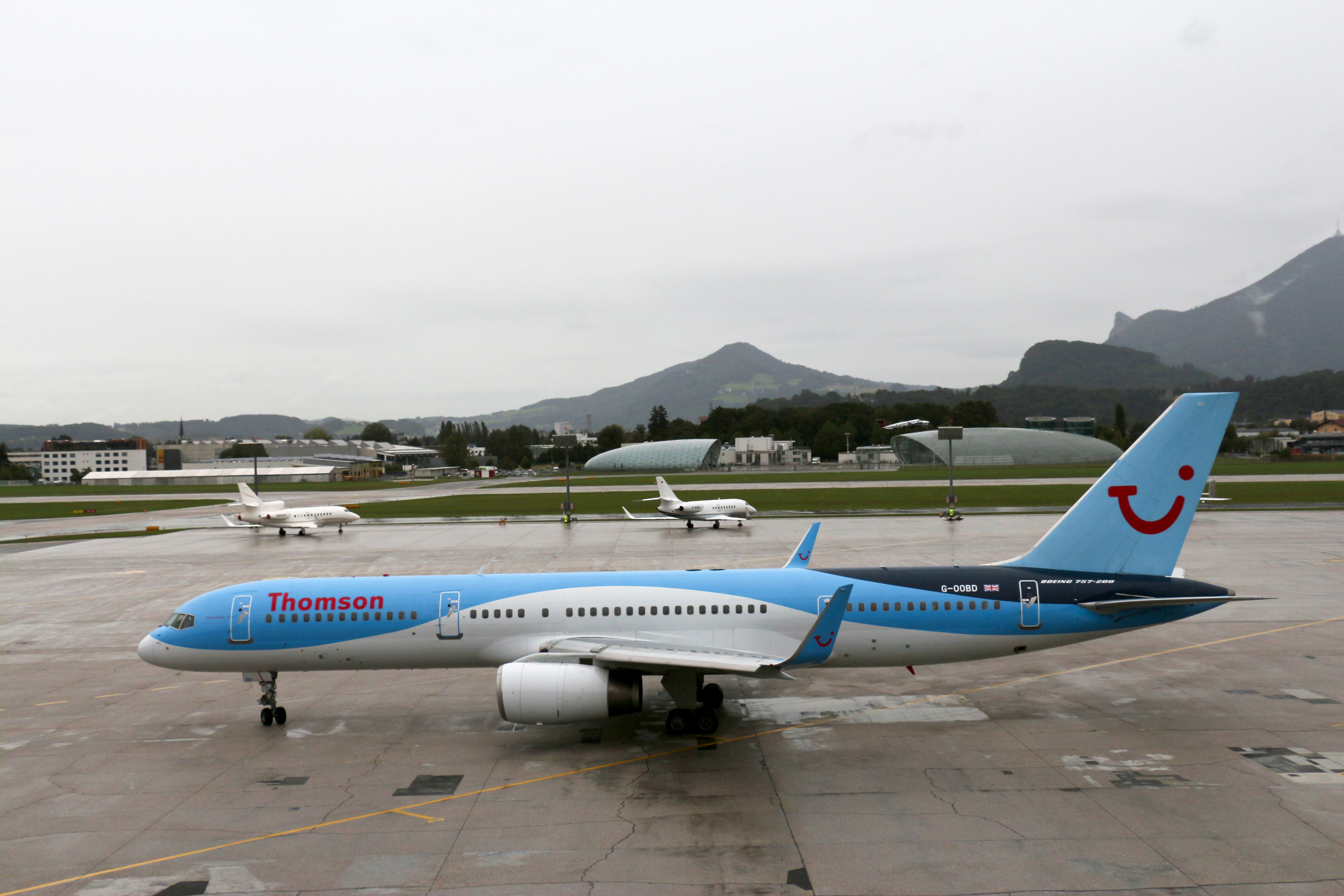 Flugzeug vor dem Abflug auf dem Vorfeld des Salzburger Flughafens